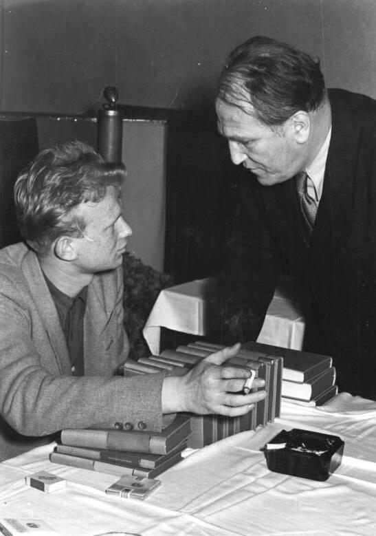 Zentralbild-Schmidtke 28.4.1952 3. Serie der "Bibliothek fortschrittlicher Deutscher Schriftsteller" erschienen. Pressekonferenz am 28.4.52 im Steinsaal des Amtes für Information. UBz: Michael Tschesno-Hell unterhält sich mit dem Nachwuchsschriftsteller Heinz Kahlau.